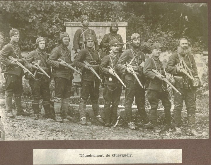 Четата на Григор Джинджифилов (1).